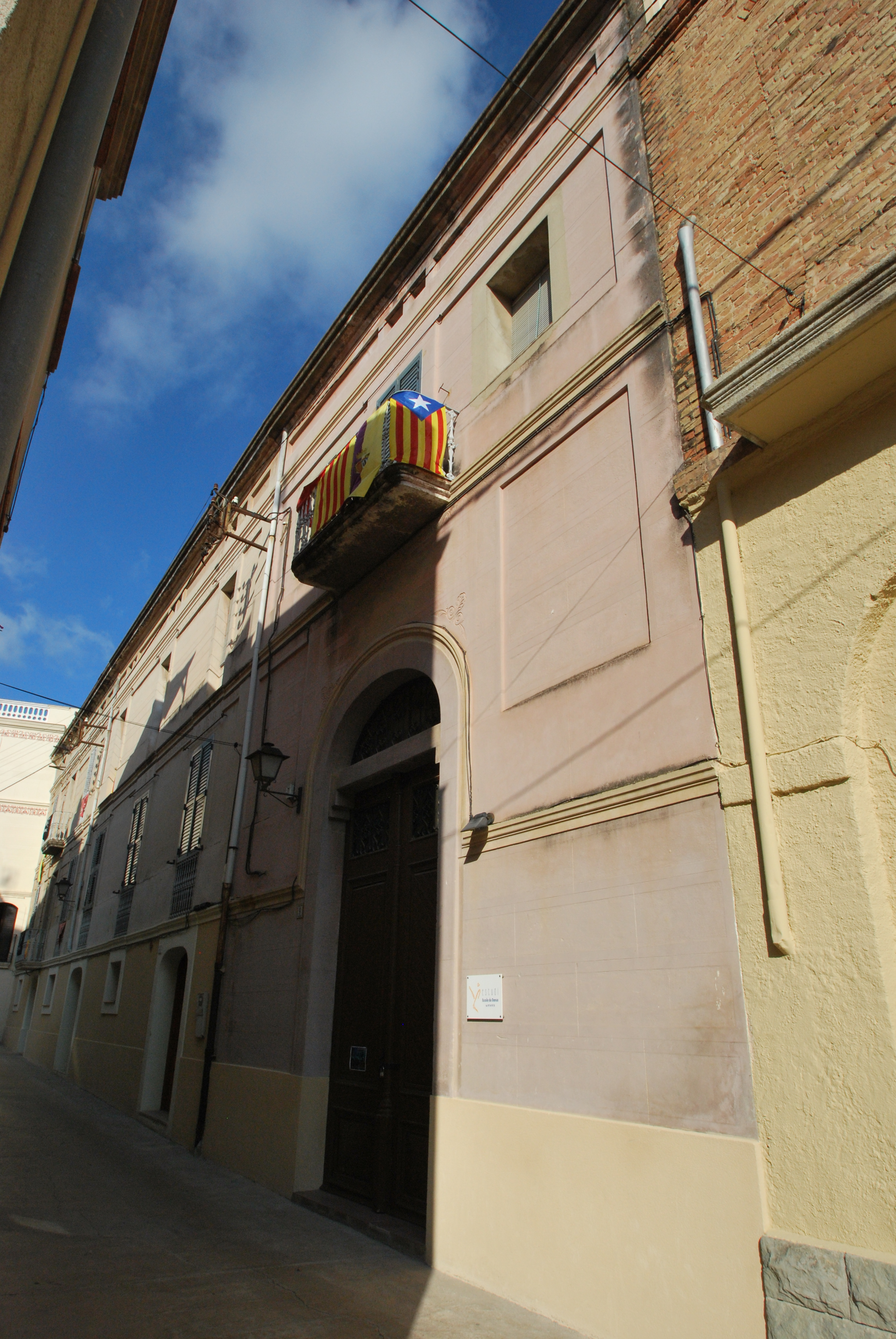 Casa al carrer Jussà, 9 (l'Arboç)